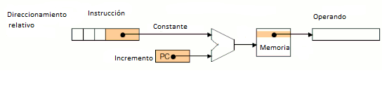 Imagen demostrativa